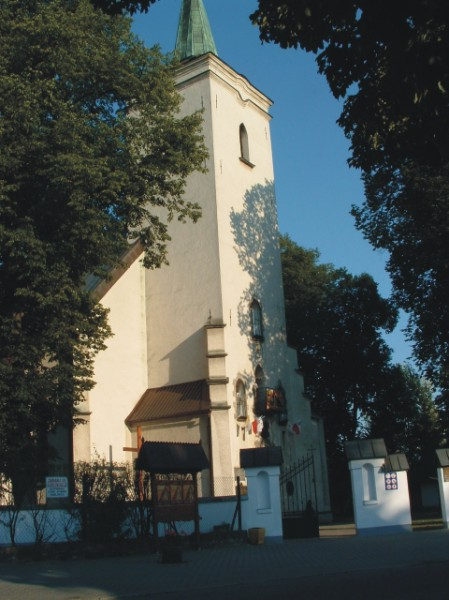 church in Ludzmierz